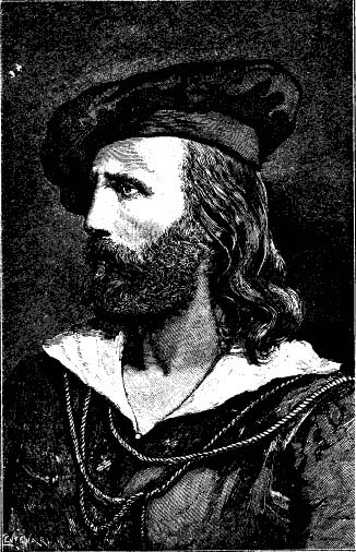 Garibaldi som ung från Runeberg